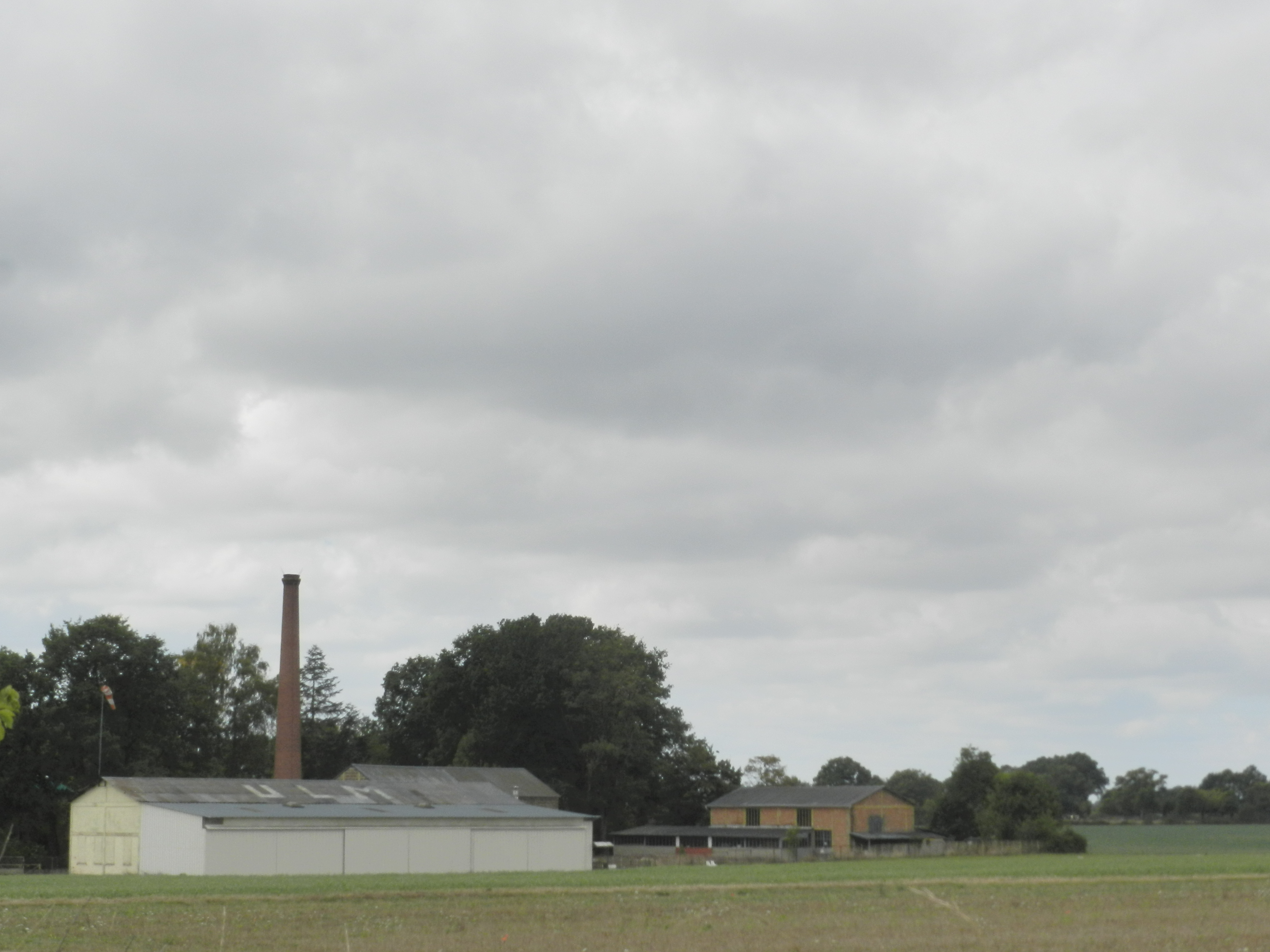 la vieille mine avec sa cheminée et les bâtiments servant de base ULM